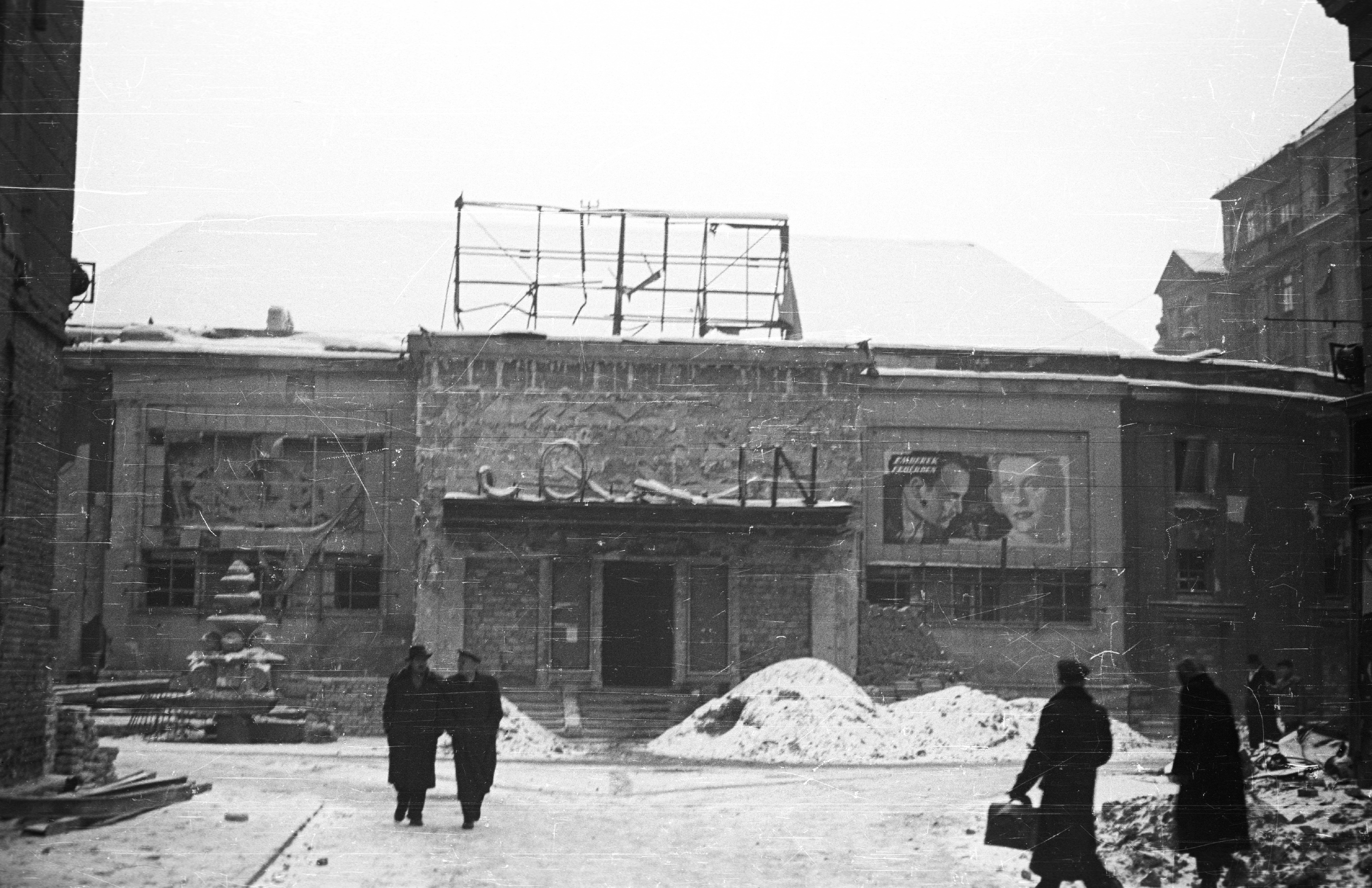 Corvin (Kisfaludy) köz, Corvin mozi. Location: Hungary, Budapest VIII. Tags: revolution, street view, movie theater, damaged building, winter, snow, war damage, label, Budapest Title: Corvin (Kisfaludy) köz, Corvin mozi.